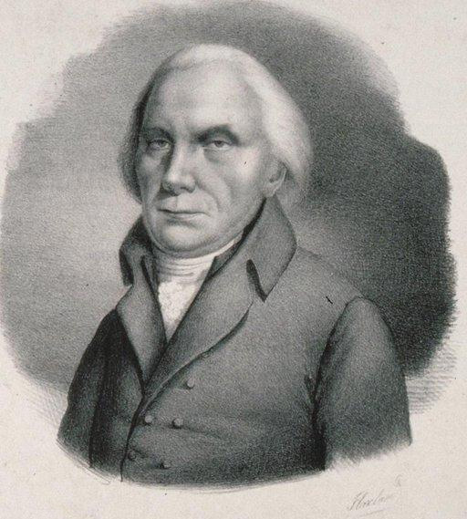 Jean Laurent Blessig (1747-1816). 1836. Bibliothèque nationale et universitaire de Strasbourg